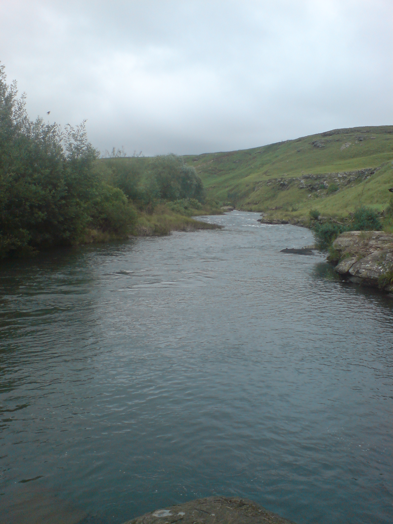 Mzimkulu River near Underberg